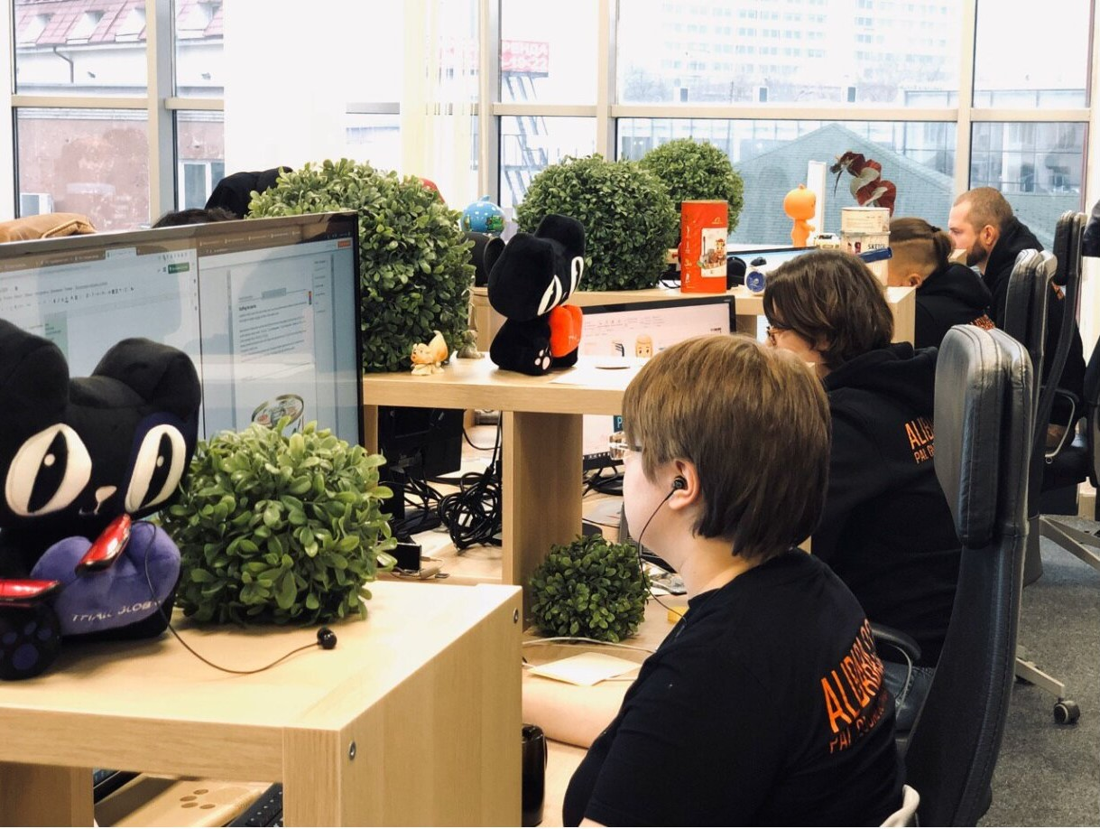 Офис компании PAL (рабочий процесс)